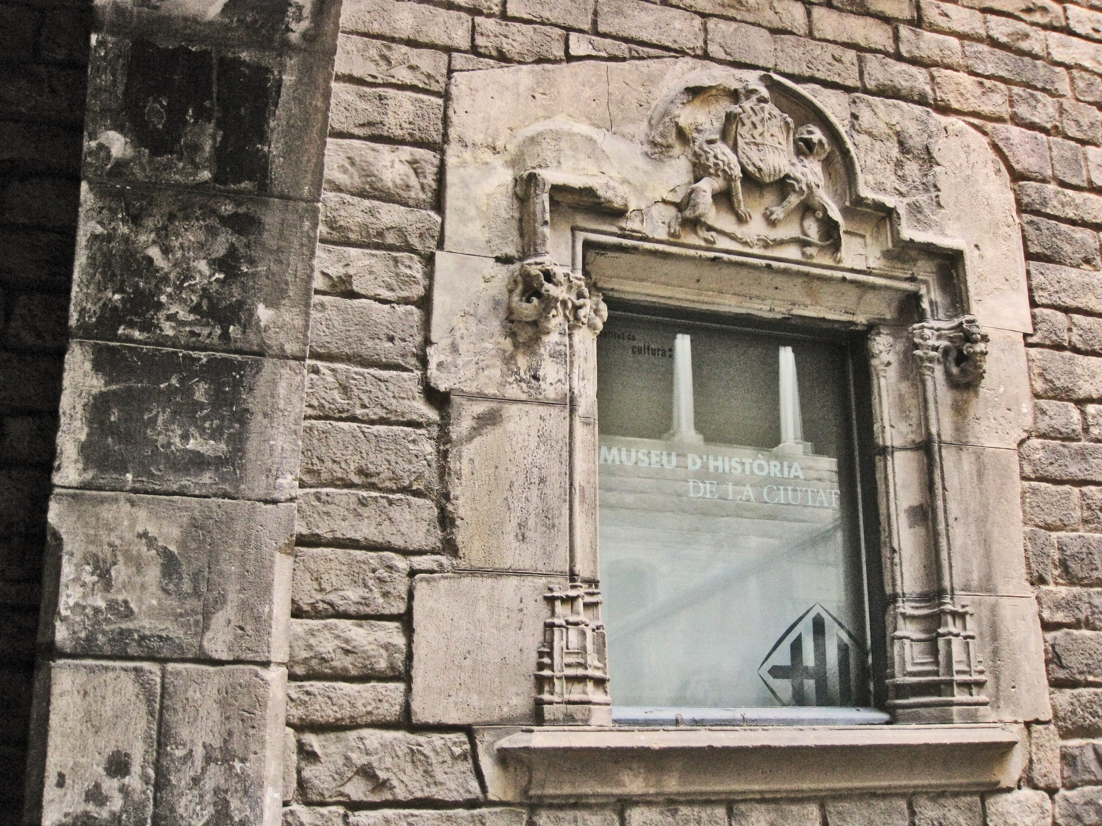 Casa Padellàs (s. XV), seu del Museu d'Història de la Ciutat, al barri Gòtic de Barcelona. L'edifici, antigament al carrer dels Mercaders, fou desmuntat i traslladat a la part de baix de la plaça del Rei quan es va obrir la Via Laietana. A la imatge, finestral de la façana principal del carrer del Veguer, amb escut nobiliari.